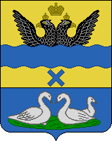 Герб Стерлитамака , утверждённый 30 декабря 1839 года. "В верхней части щита герб Оренбургской губернии. В нижней - 3 серебряных гуся в голубом поле".